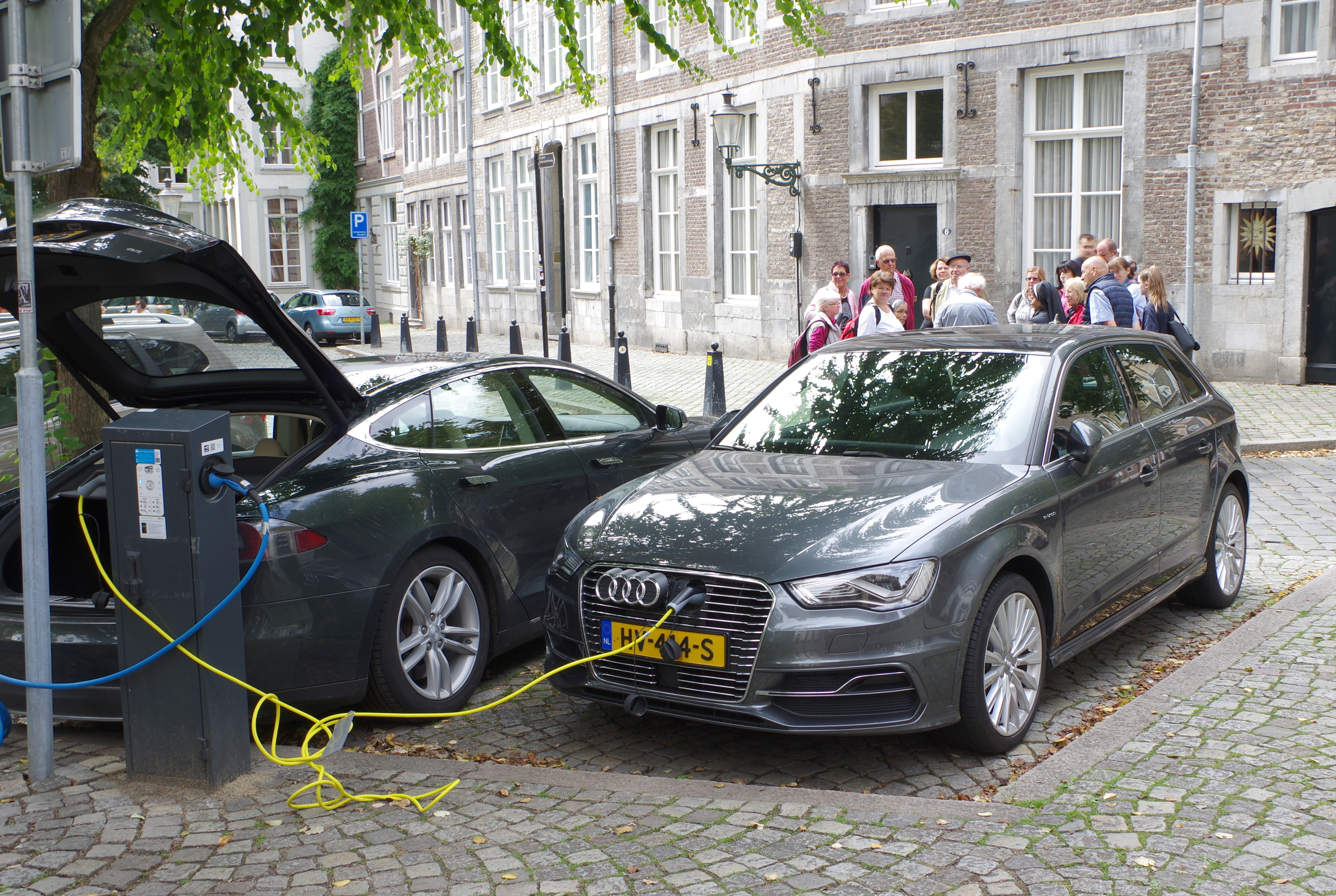 Audi A3 e-tron an einer Ladestation in Maastricht (Grote Looiersstraat).